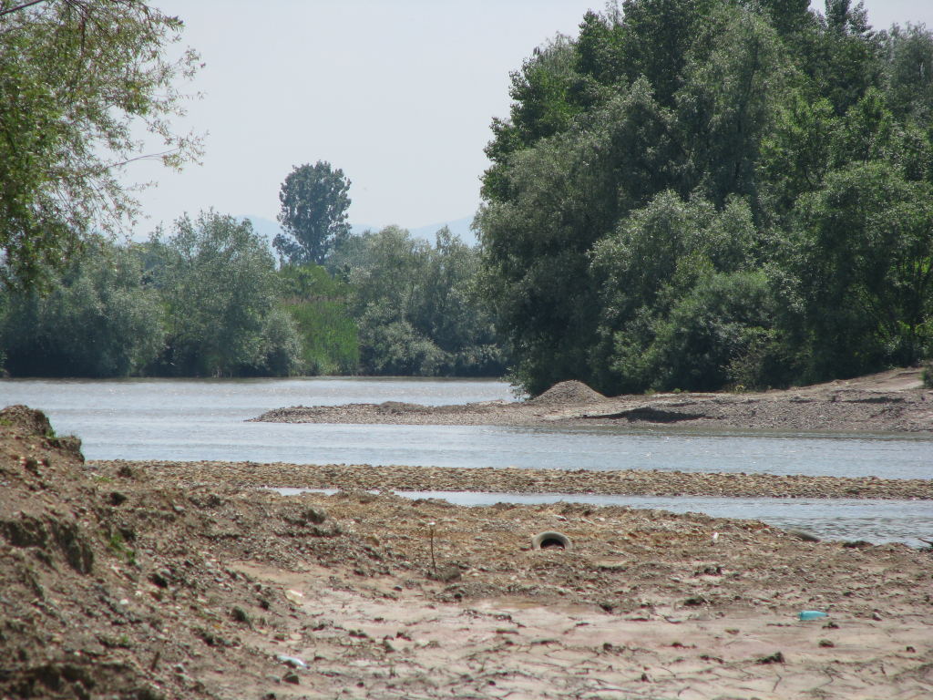 Somesul vazut vara